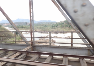 Malagasy: Mangoro